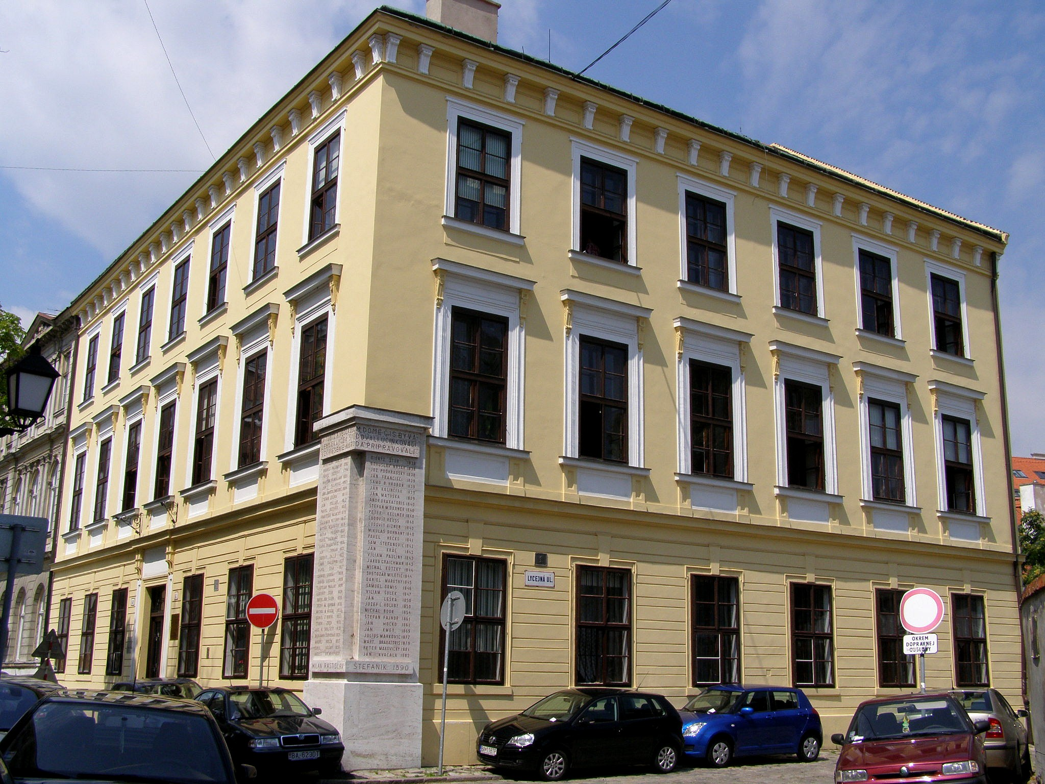 Celkový pohľad na budovu bývalého Evanjelického lýcea (nového) na nároží Konventnej (č. 13) a Lýcejnej ulice. Budovu v rokoch 1854 - 1855 postavili podľa projektu staviteľa G. E. Bendla. Dnes v nej sídli Literárnovedný ústav SAV Object location48° 08′ 49.92″ N, 17° 06′ 16.92″ E